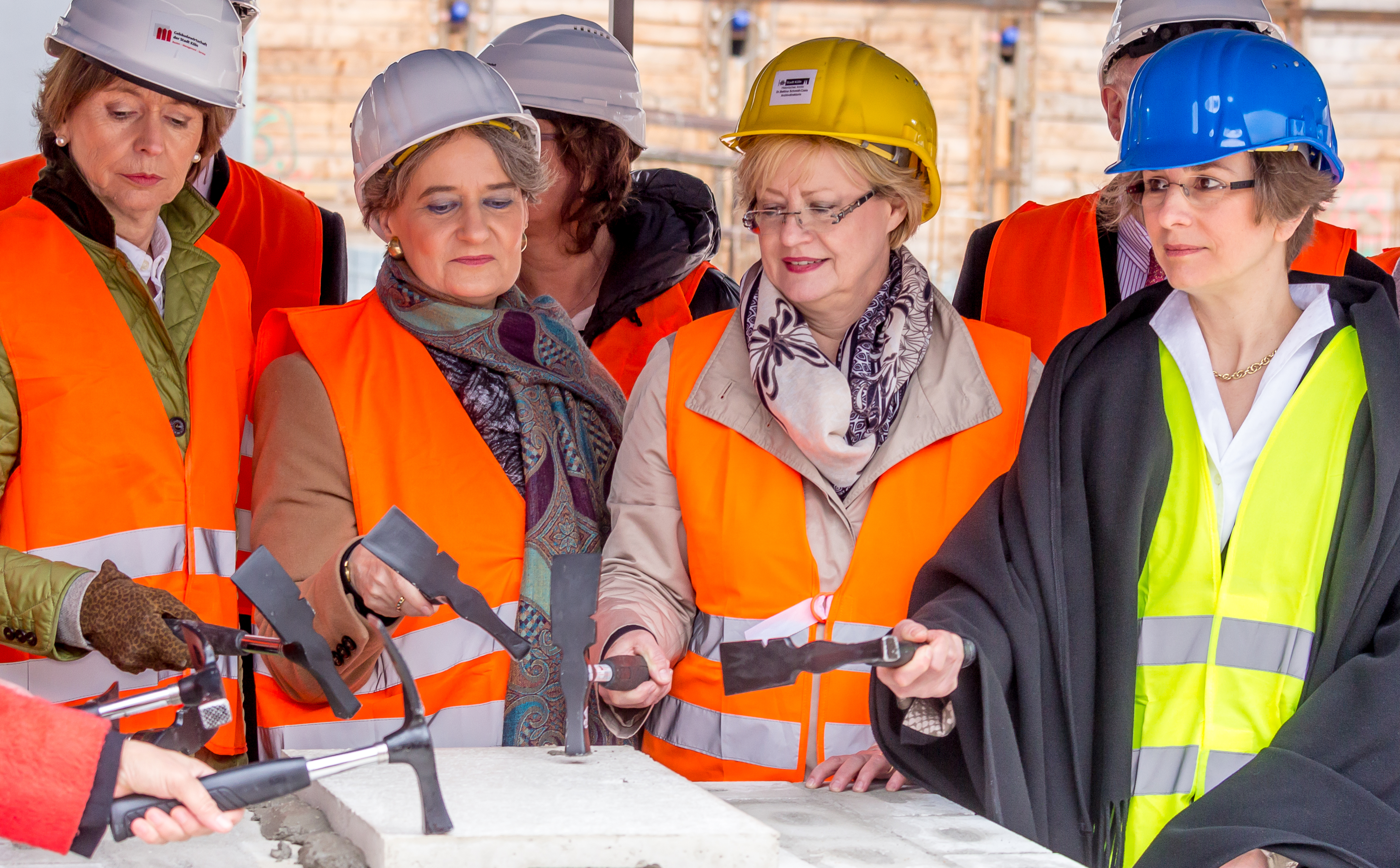 Grundsteinlegung für den Neubau des Archigebäudes des Historischen Archivs der Stadt Köln und des Rheinischen Bildarchivs am Eifelwall